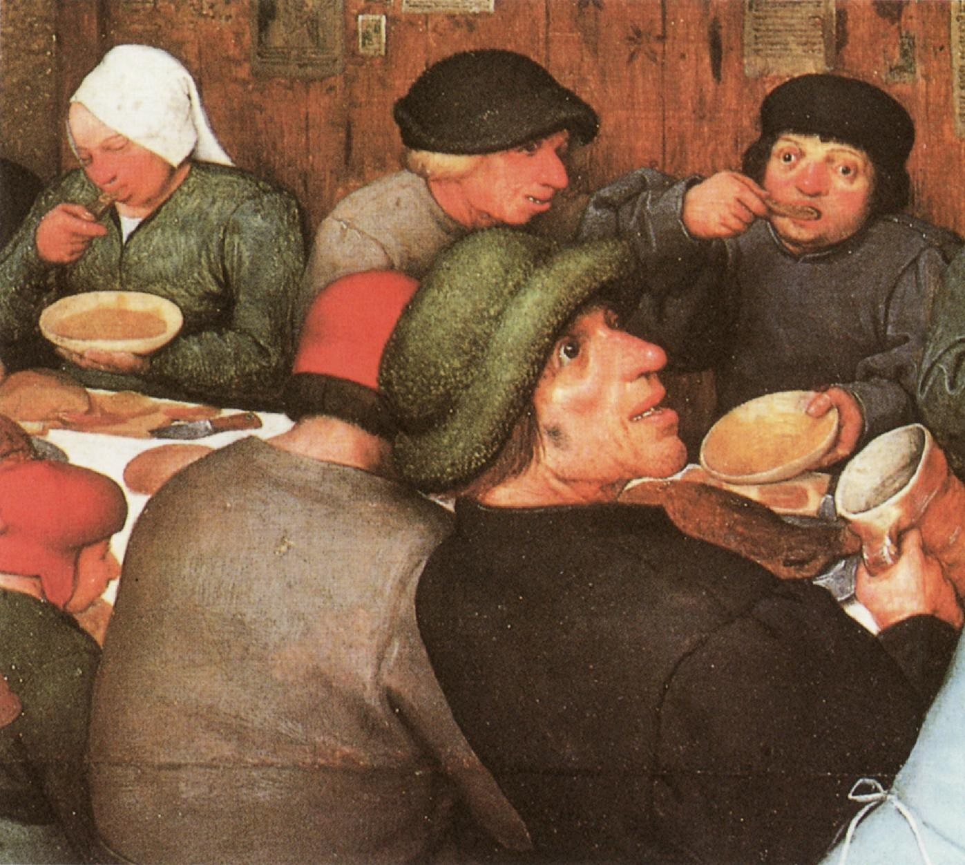 Ausschnitt aus Bruegels Gemälde: Die Bauernhochzeit